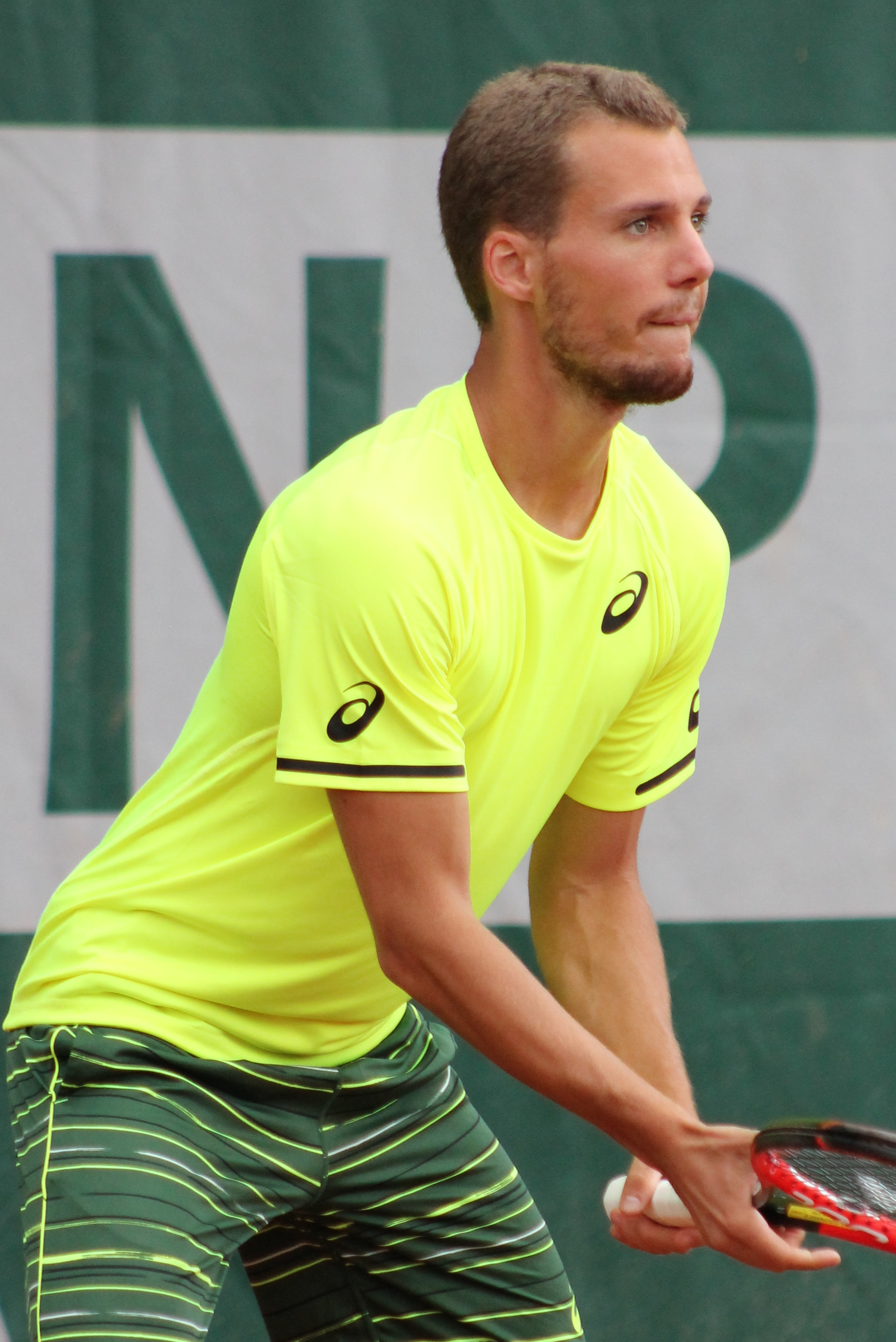 Michon RG15